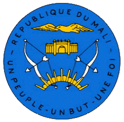 Escut de Mali.